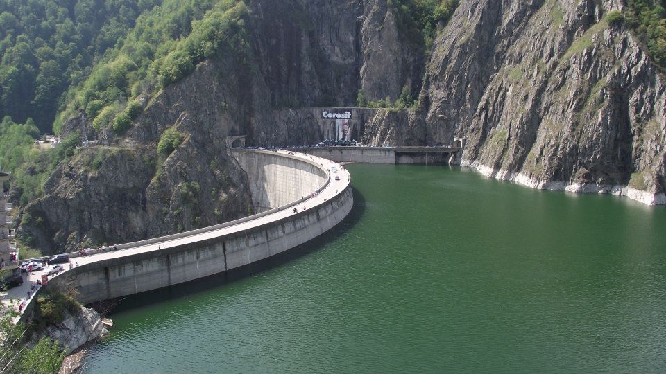 Lacul văzut de pe baraj.